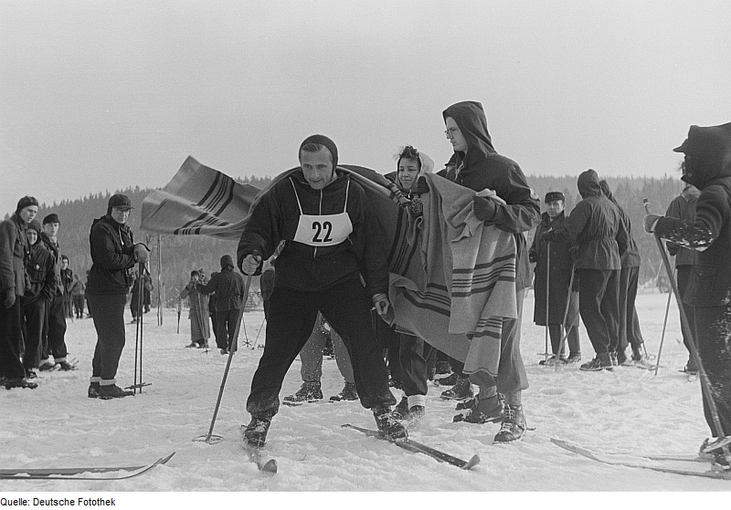 Original image description from the Deutsche Fotothek Teilnehmer eines Skilanglaufwettkampfs im Ziel